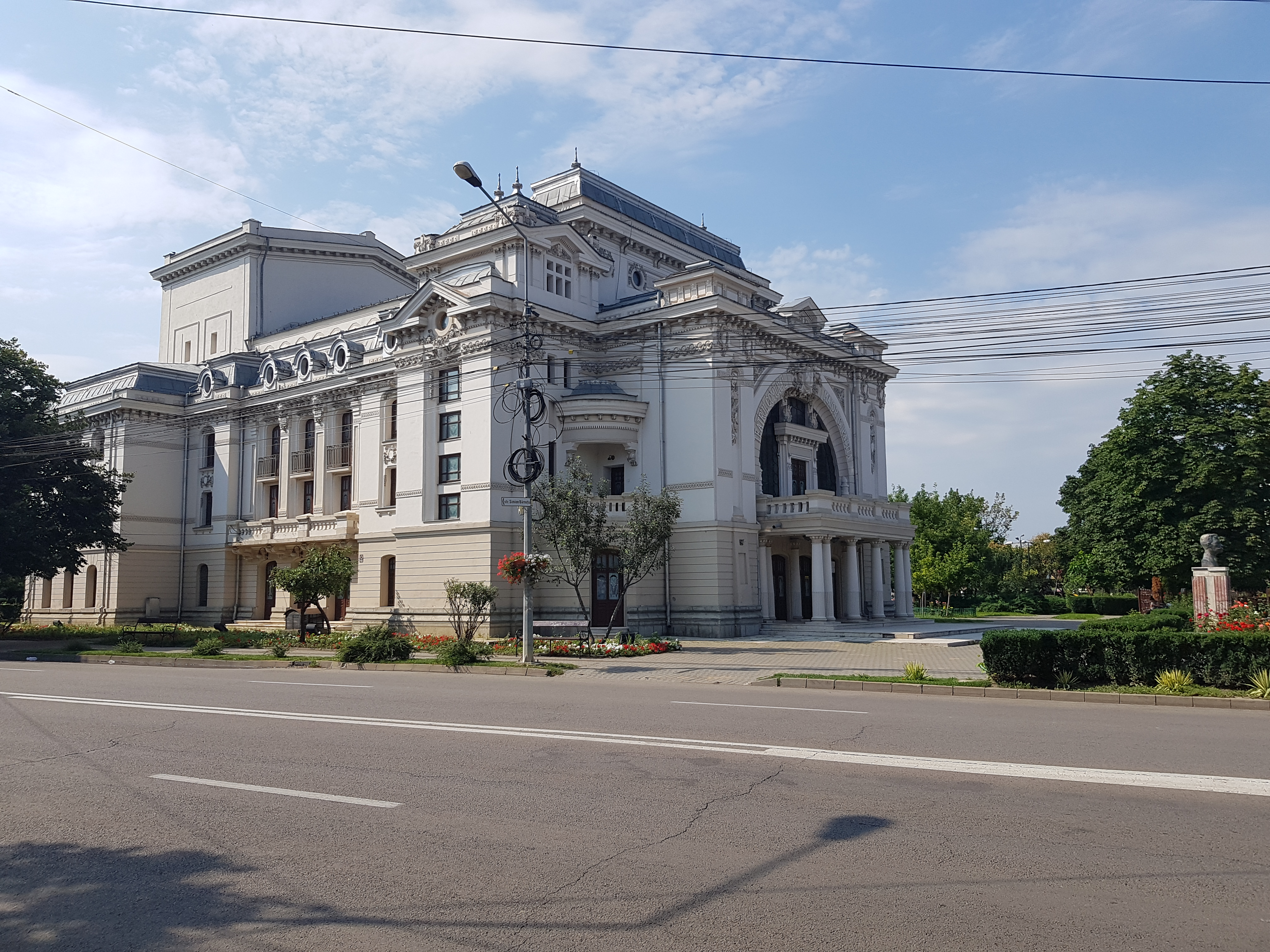 Teatrul Municipal „Maior Gheorghe Pastia”